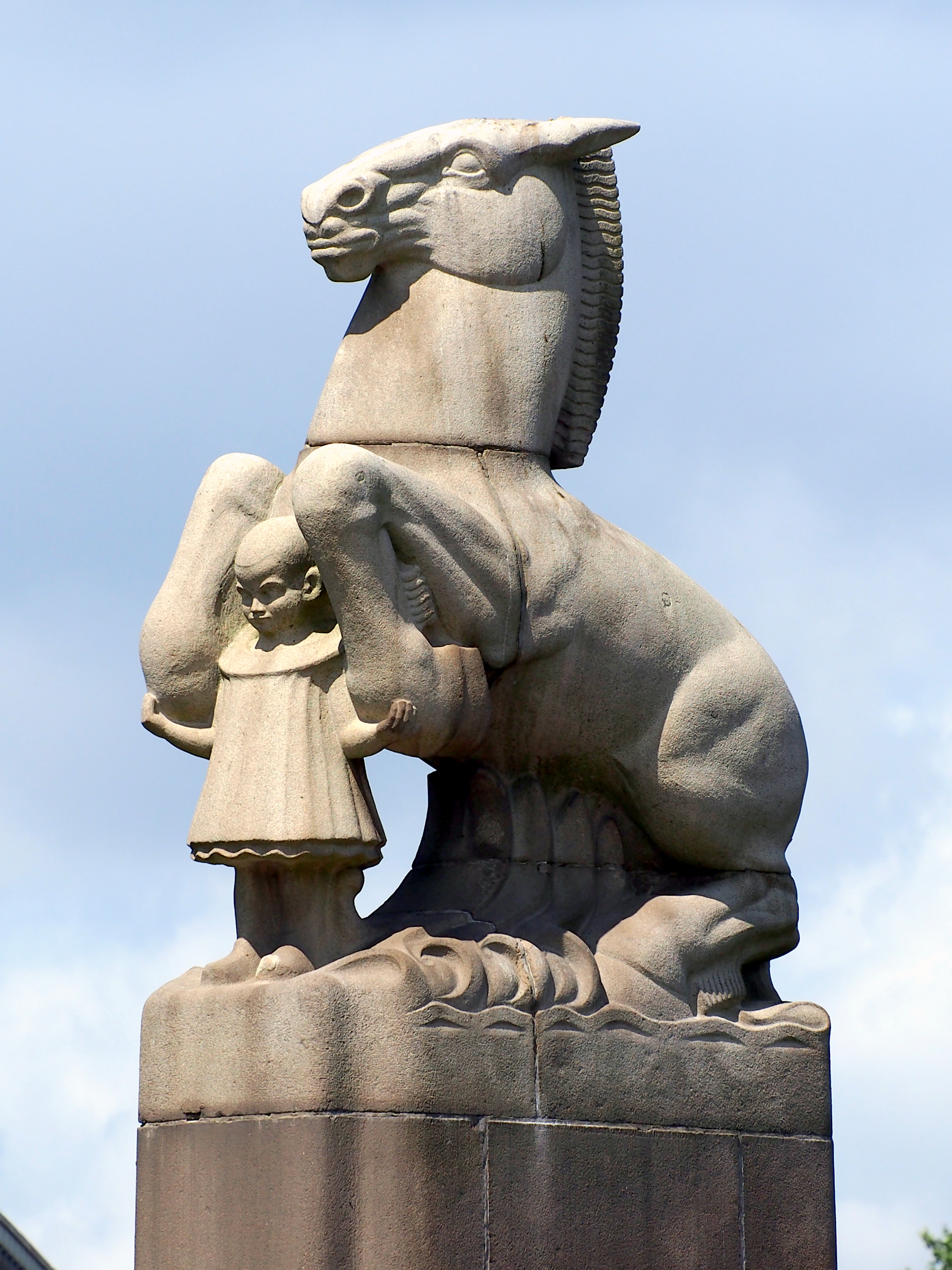 Beeld: De onbevangenheid van het leven.